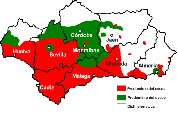 Montalbán en el mapa de ceceo.